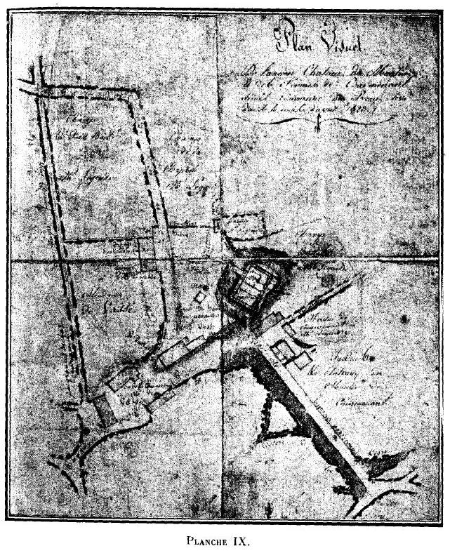 Le Donjon de Courmenant, ses origines, ses seigneurs et possesseurs, son musée